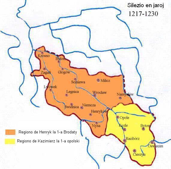 Mapa Śląska w latach 1201-1202 z opisami a języku esperanto.